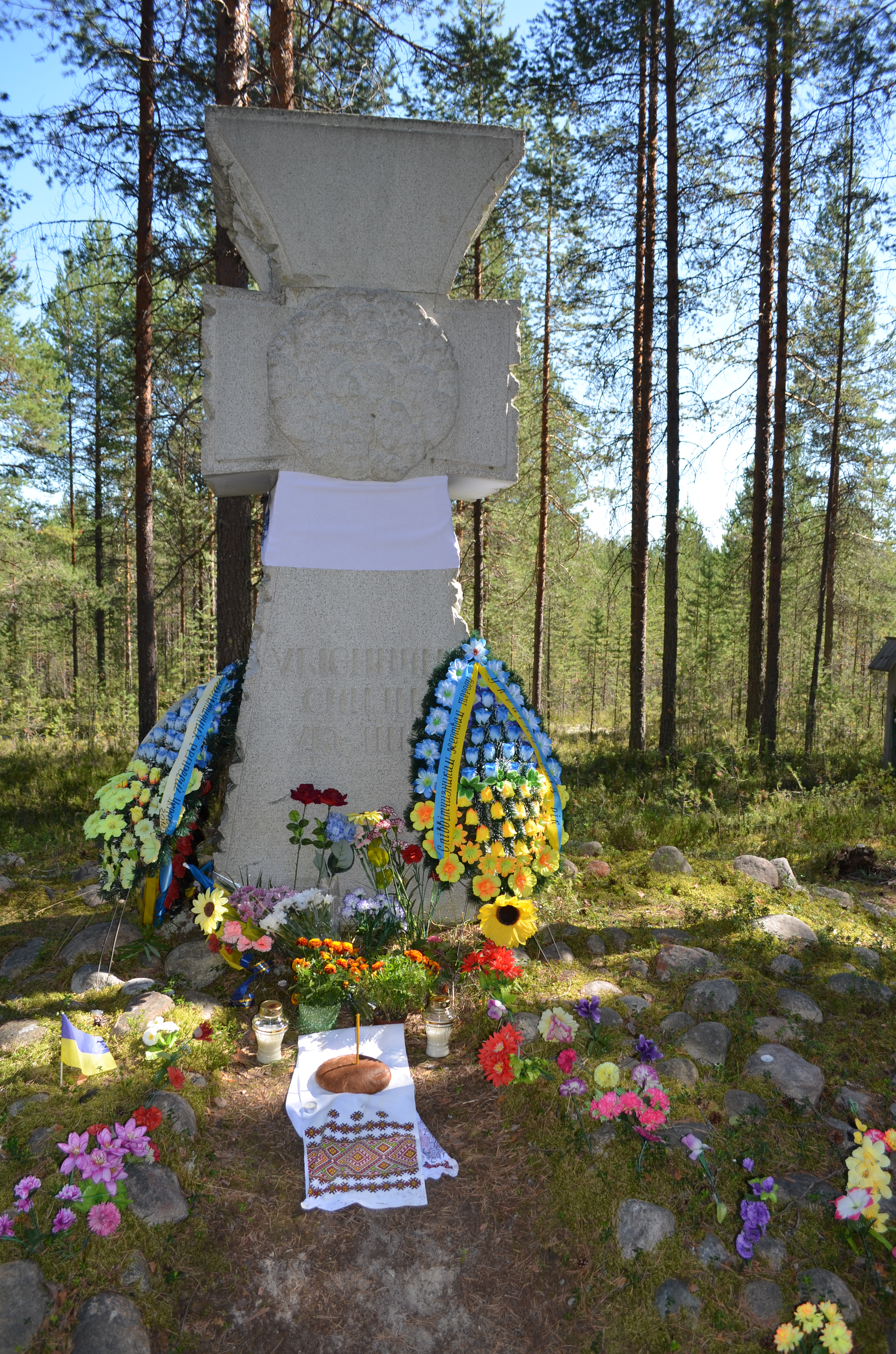 Урочище Сандармох. Дні пам’яті. Український козацький хрест "Убієнним синам України"